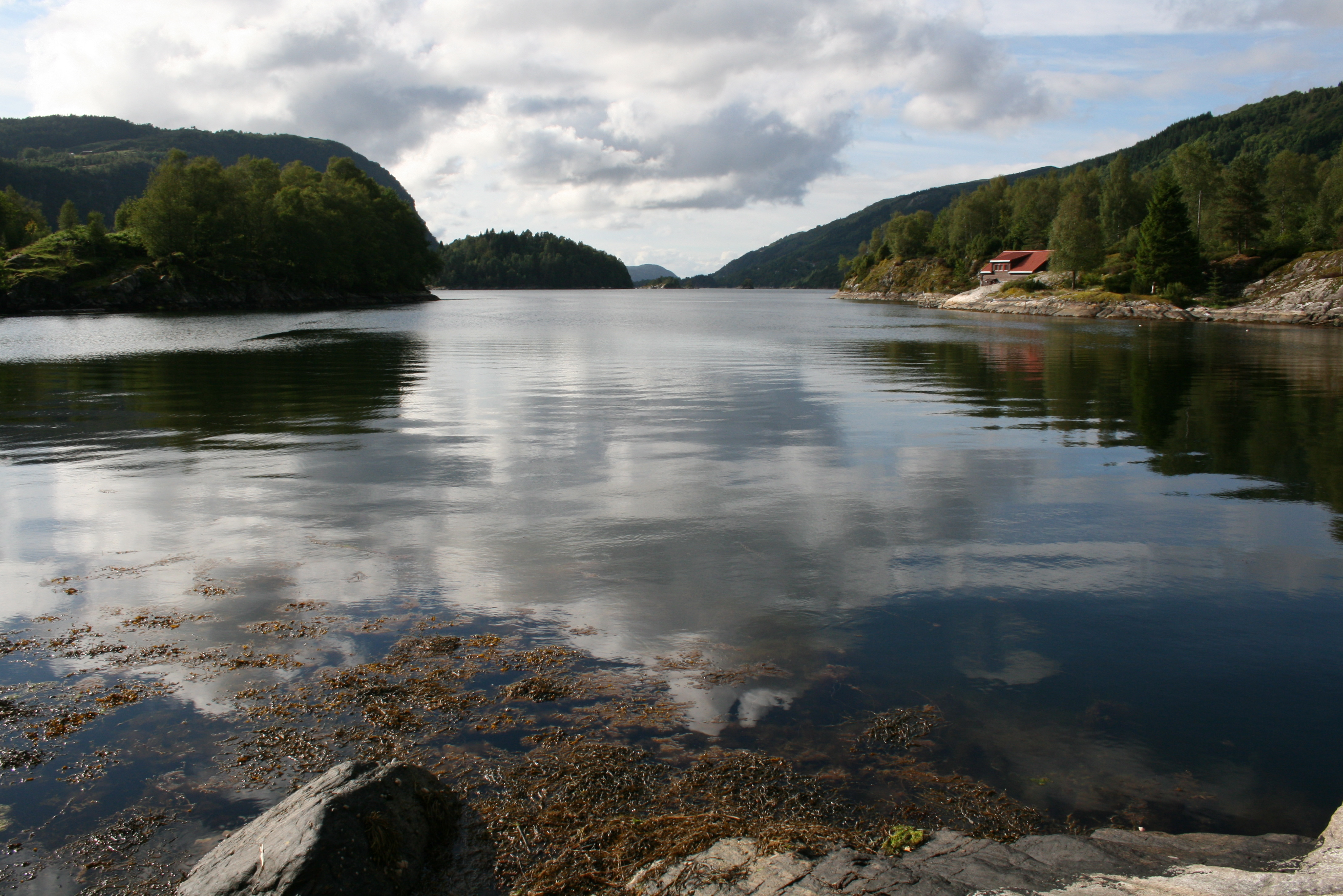 Hindnesfjorden